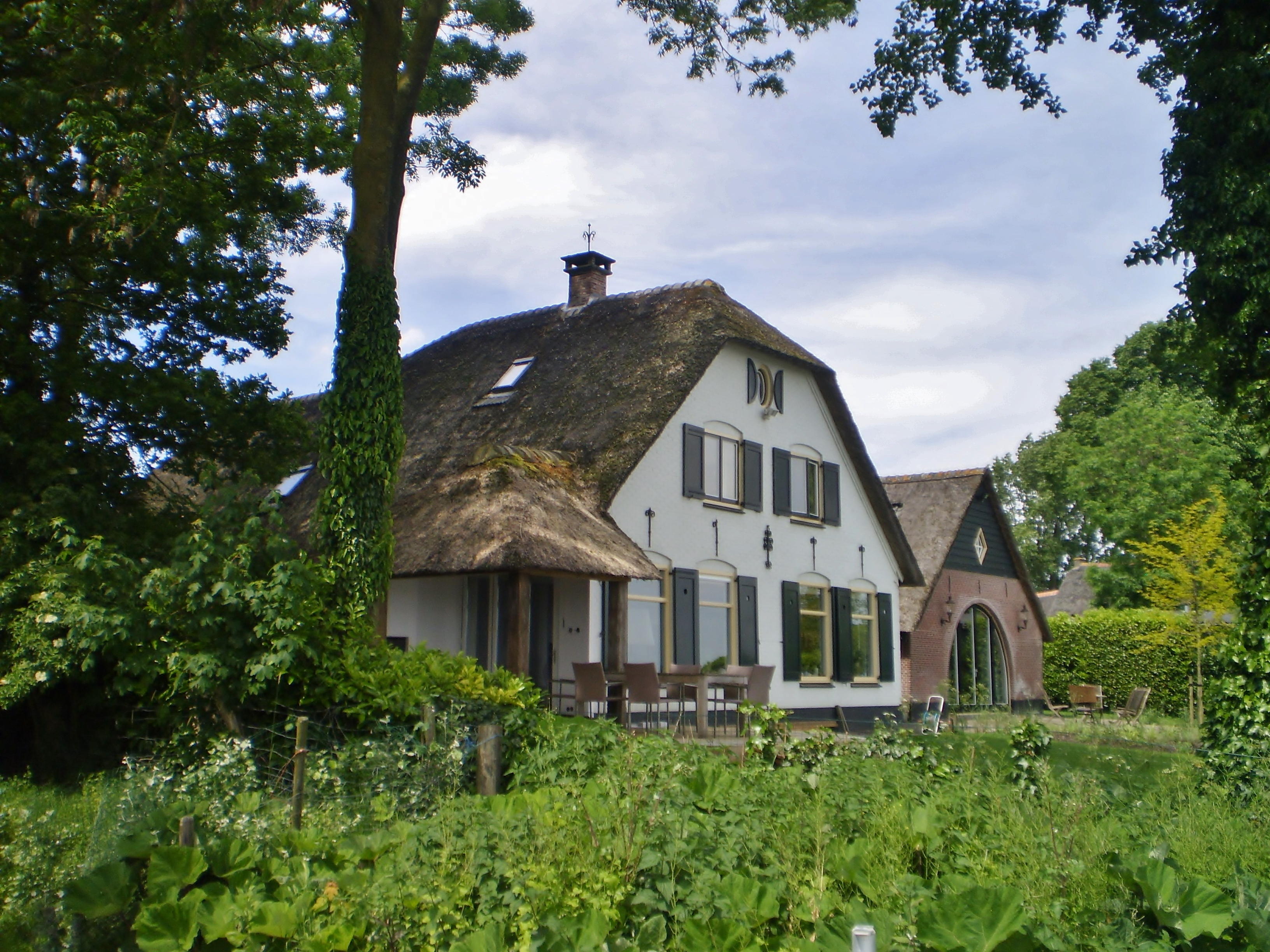 Grote Melmweg 33 voorzijde, gericht op de Eem